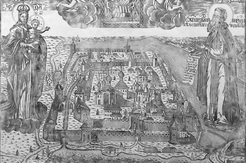 Центральная часть гравюры с изображением архитектурного ансамбля Кирилло-Белозерского монастыря. В центральной части листа - весь комплекс монастырских построек к.XVII - начала XVIII в.в., справа от него - образ преподобного Кирилла Белозерского со свитком в руках, слева - Богородица с младенцем Иисусом на руках. В правом нижнем углу - надпись: «Грыдоровалъ в Москве Мартинъ Нехорошевский», в левом нижнем углу: «...а возбоновлена 1742 году при бытности архимандрита Вавилы». Размер гравюры: 78x57,5 см. Хранится в Кирилло-Белозерском монастыре.